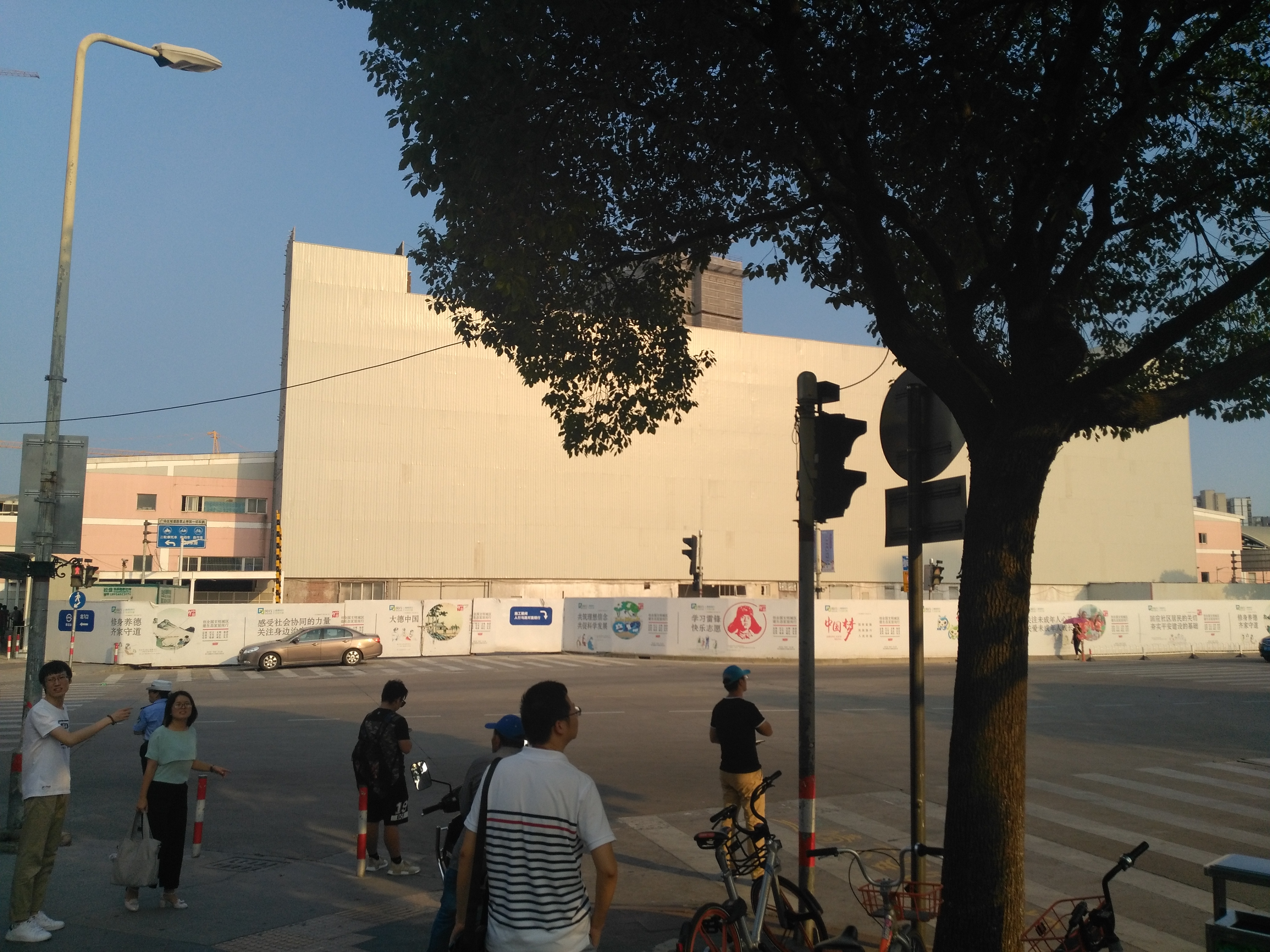 中文（中国大陆）: 被拆除裙楼的莘庄地铁站(北广场)